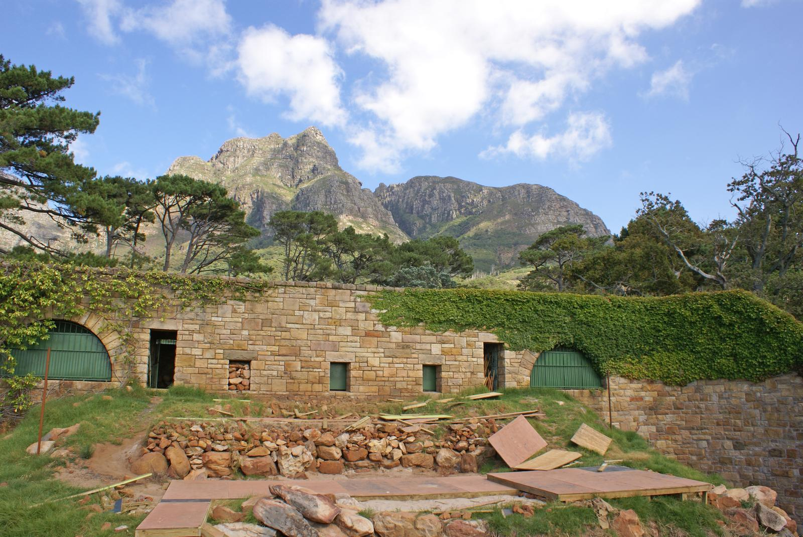 Old zoo in Groote Schuur - Cape Town